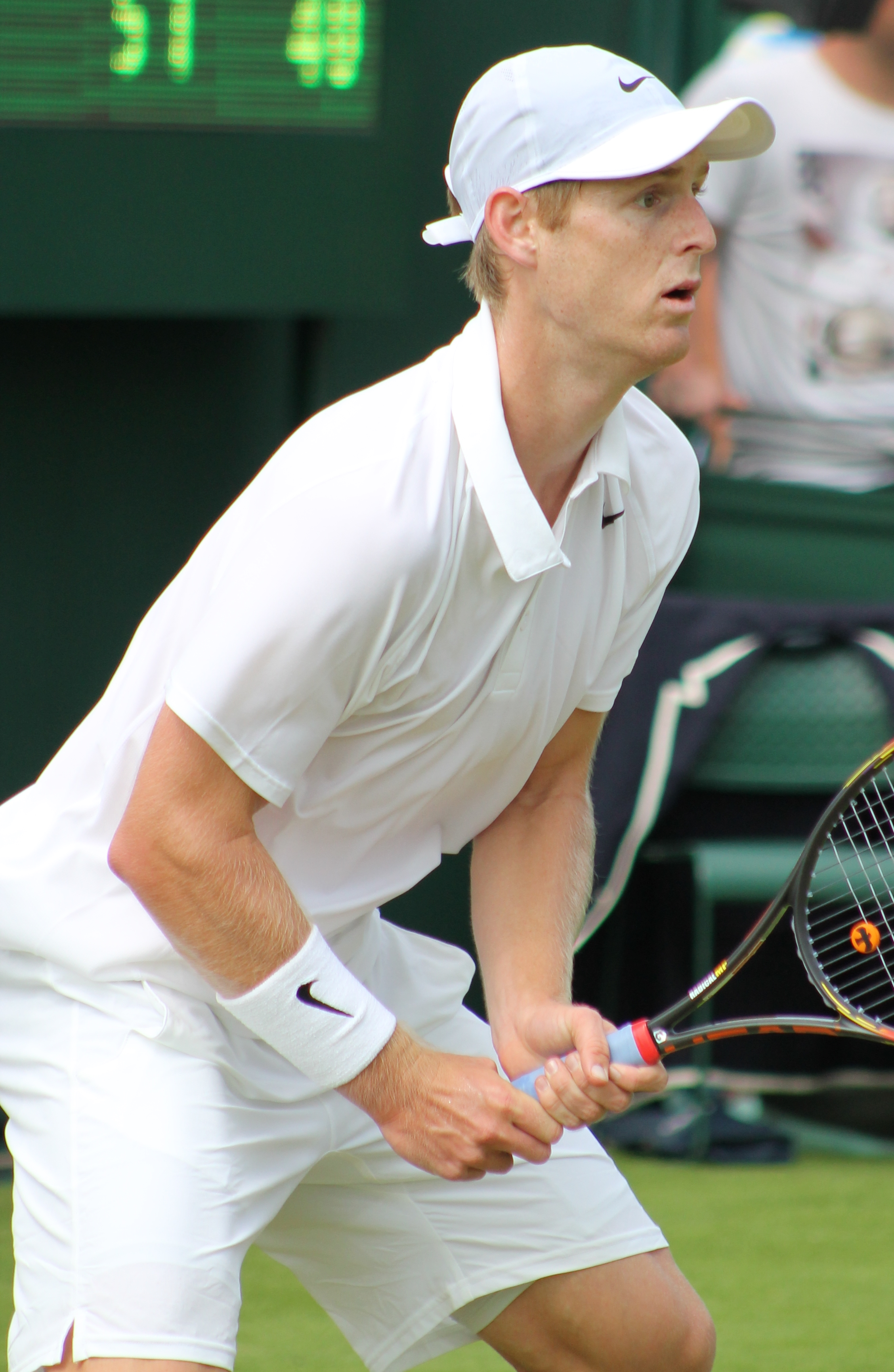 Saville WM14 (7)